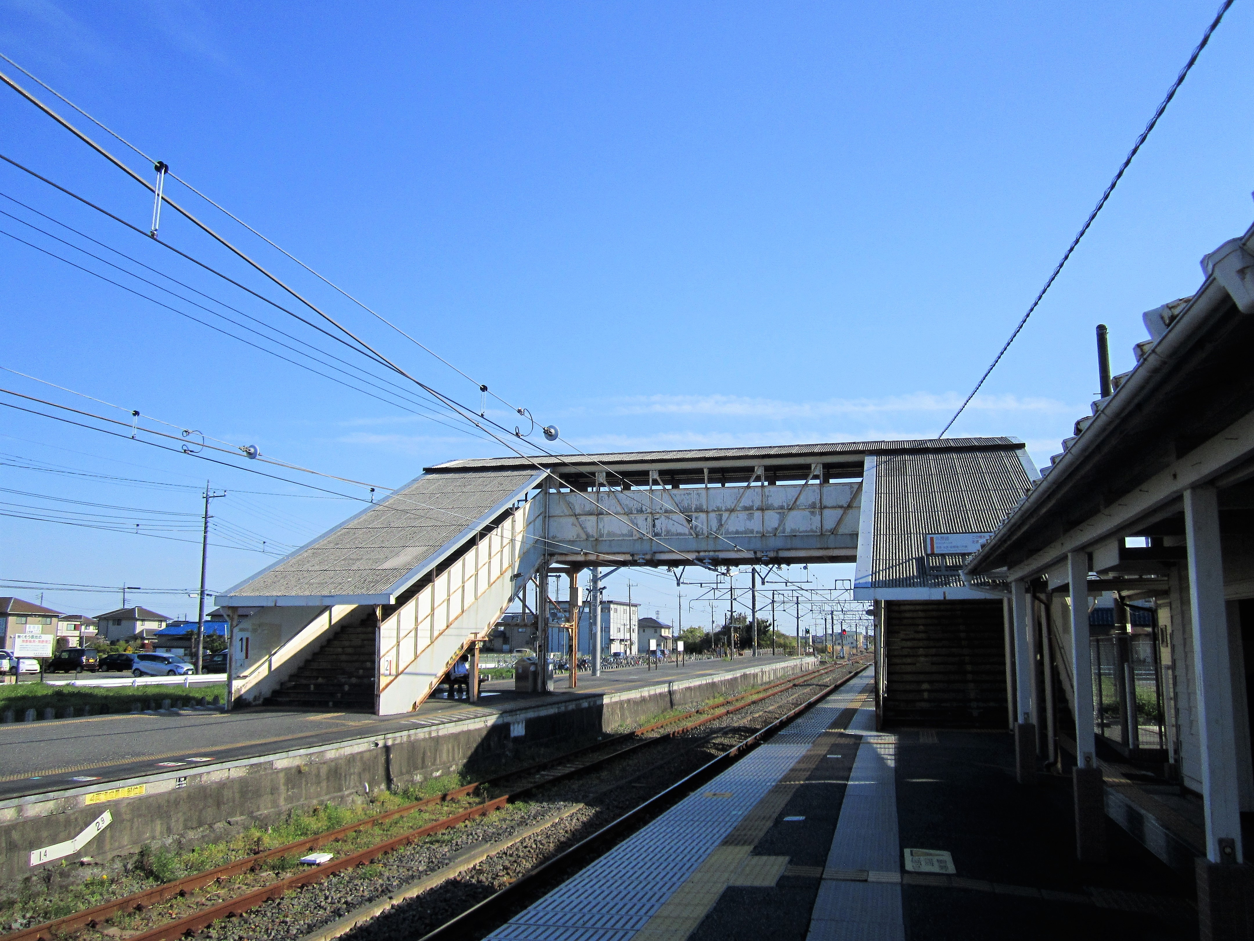 本納駅ホーム Canon PowerShot A2200